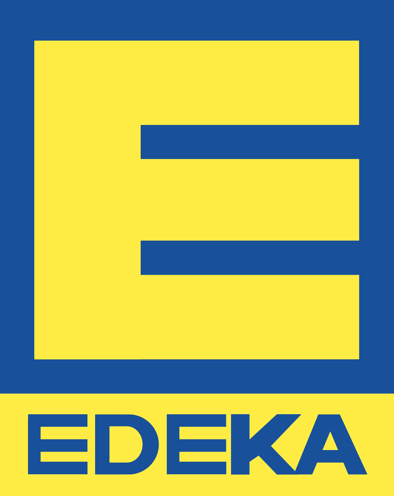 Logo obchodního řetězce Edeka po roce 1965